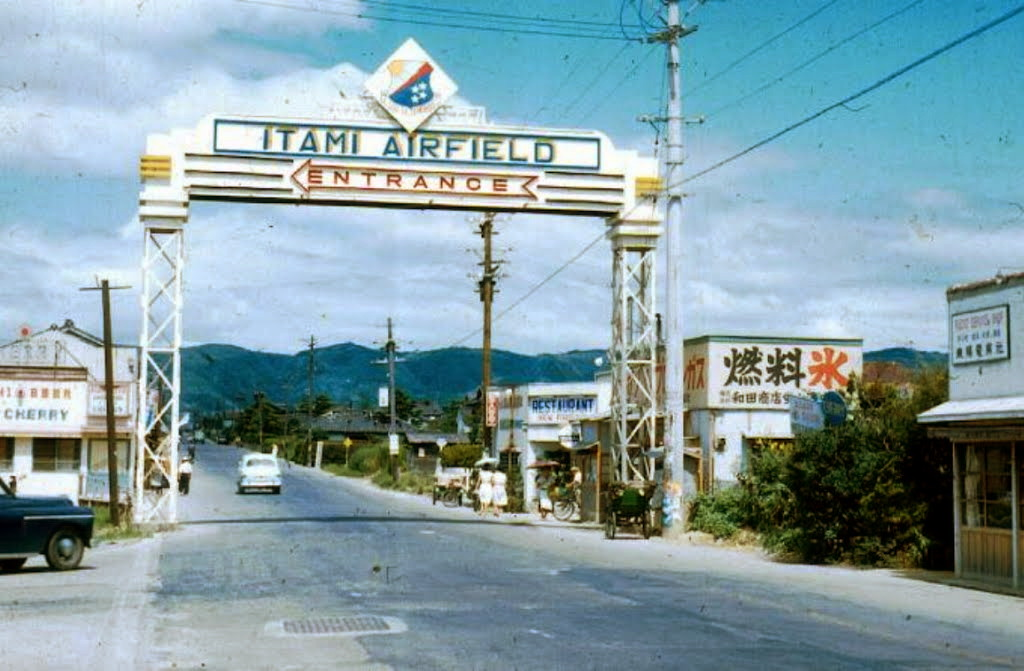 1950年代後半、国道176に掲示された伊丹航空基地入口ゲートサイン